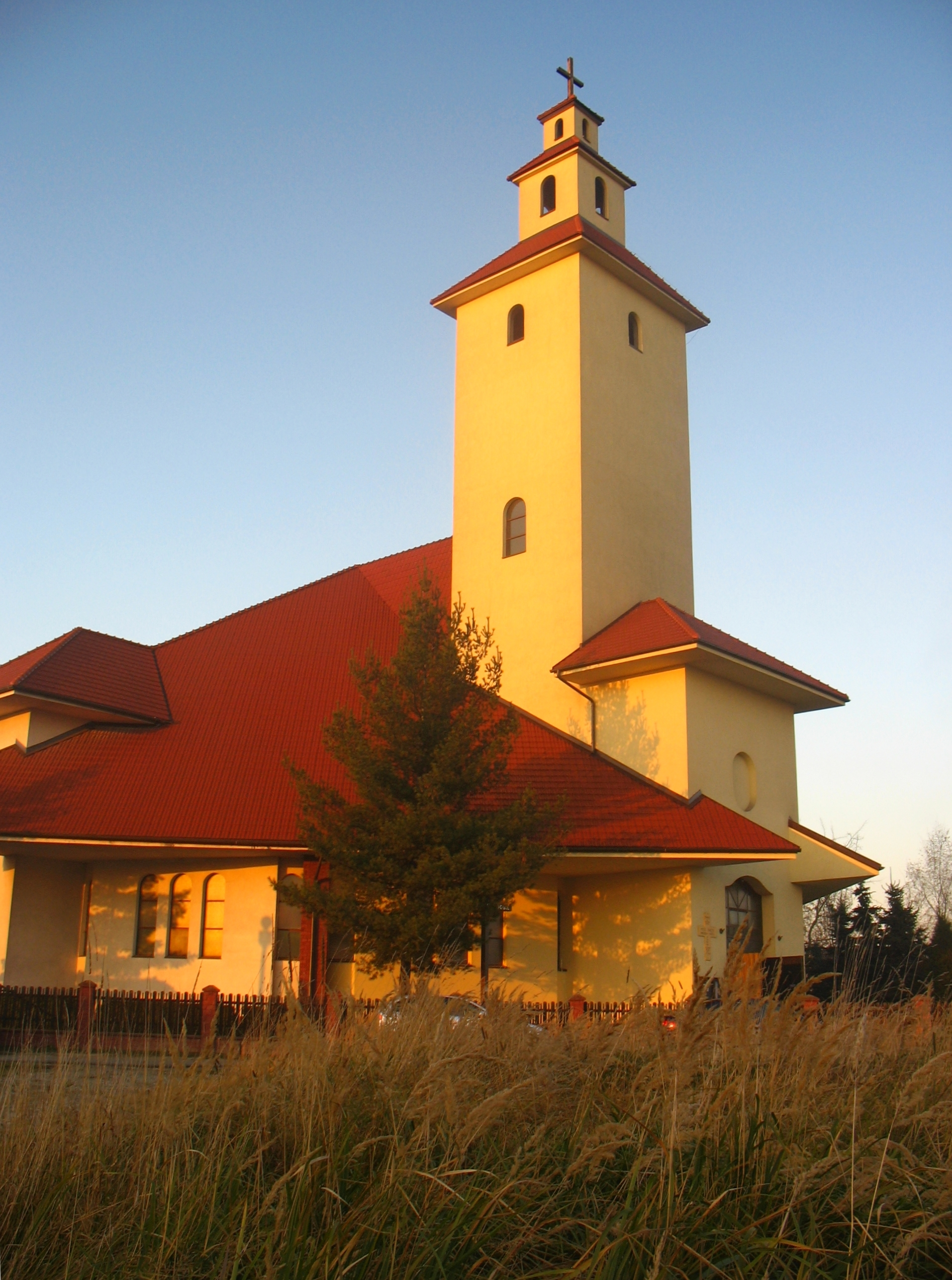 widok od strony południowo-zachodniej